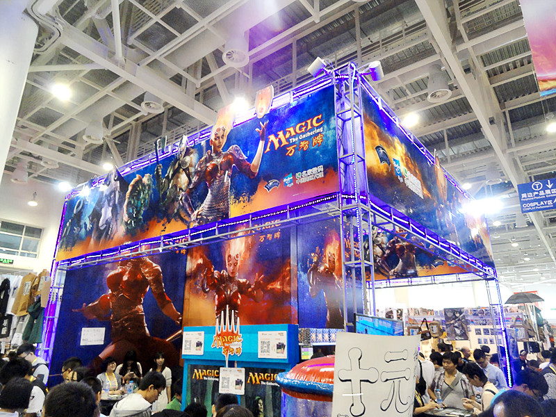 中文（中国大陆）: 第六届厦门国际动漫节的《万智牌》展位。